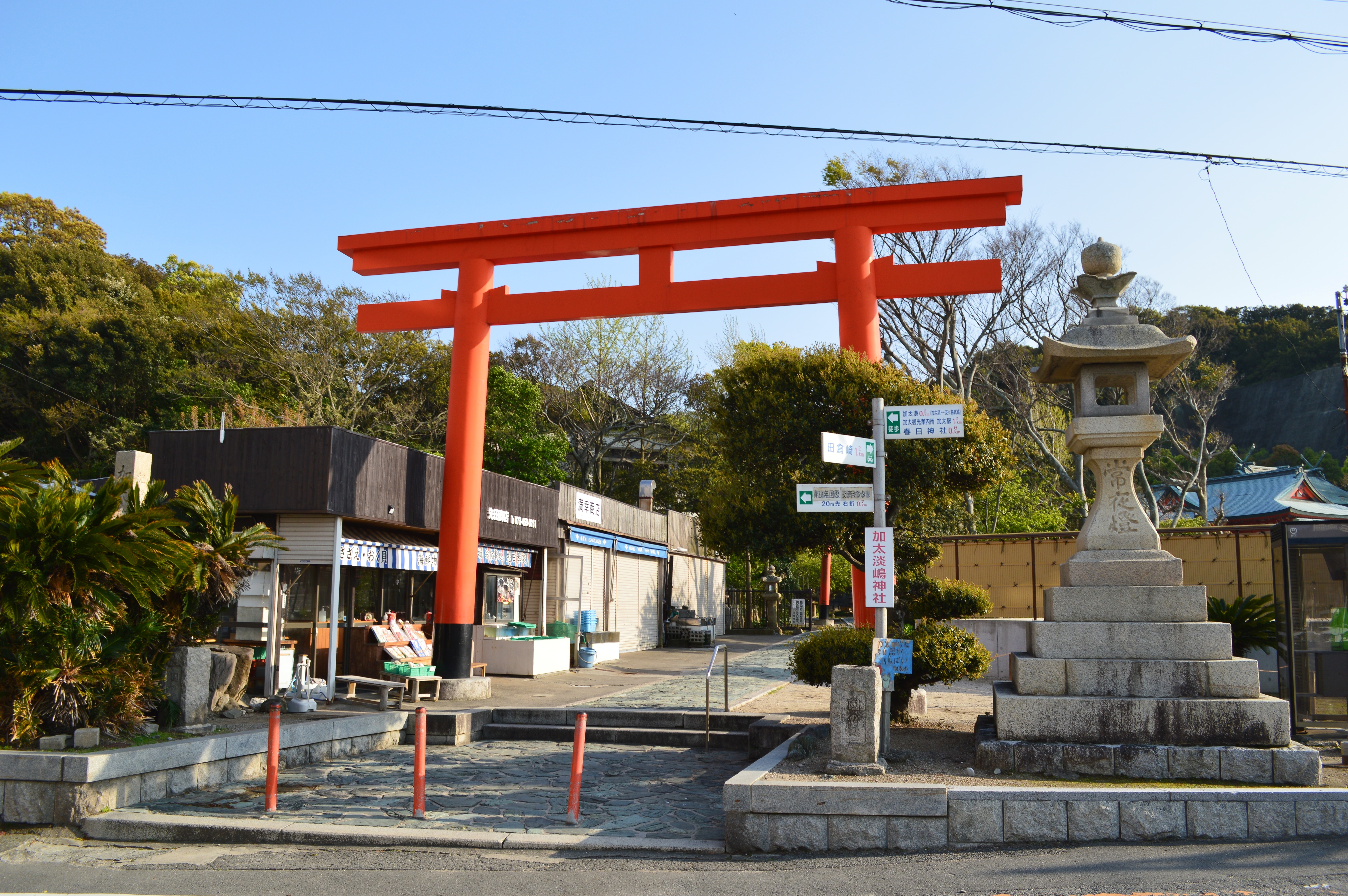 加太淡嶋神社 鳥居 Nikon D3200